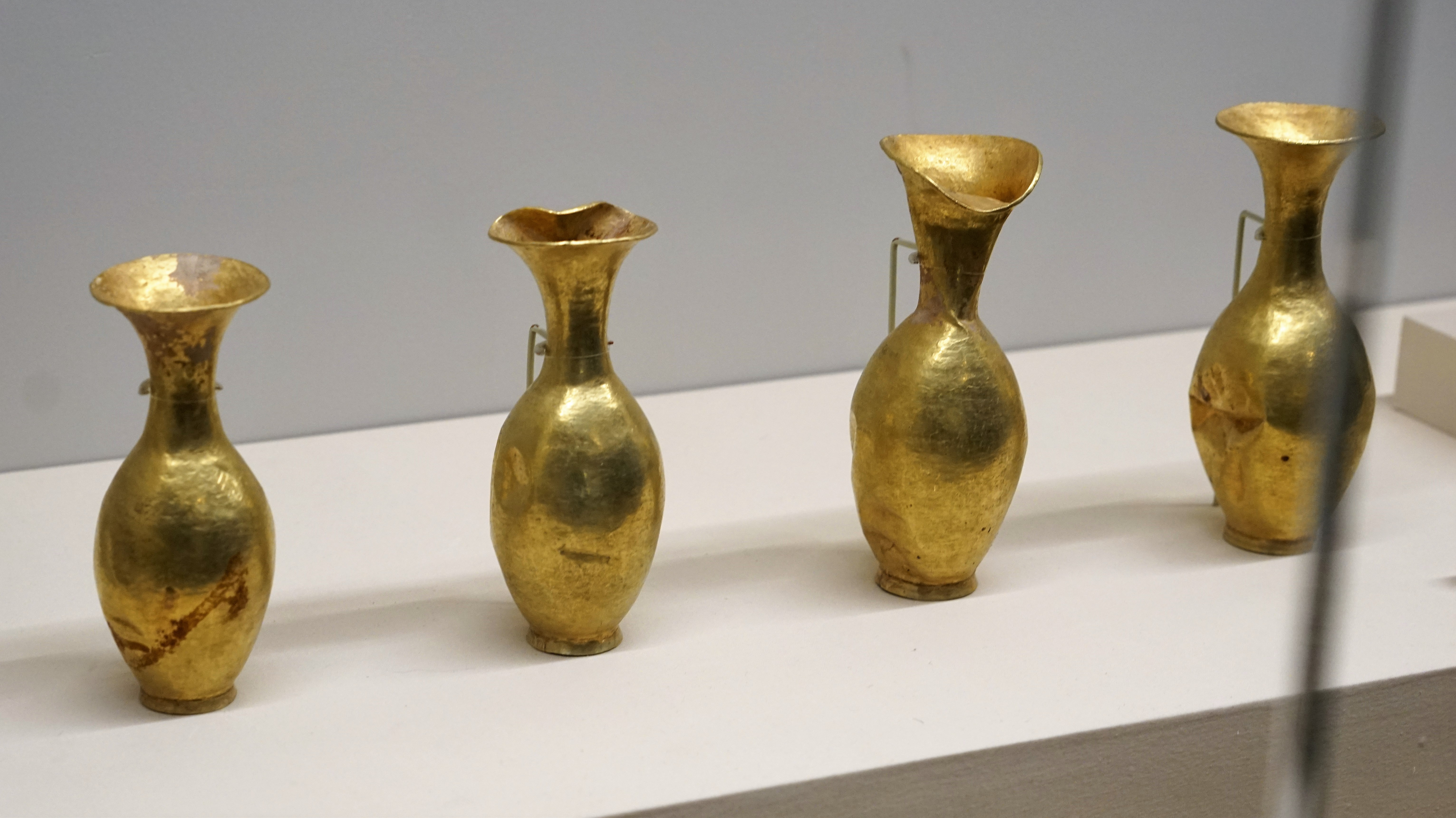 中文（中国大陆）: 青海3.15盗掘古墓葬古文化遗产案追缴。一级文物。唐·吐蕃（7-9世纪）。器身捶揲而成。